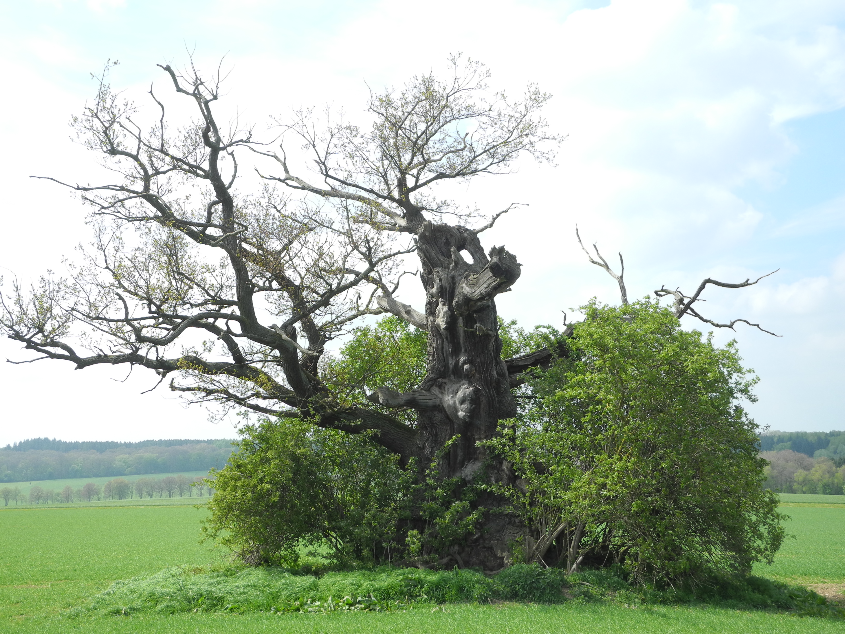 Naturdenkmal im Landkreis Kassel 6.33.361. 4 sehr alte Huteeichen (von ursprünglich 6) auf einem Acker bei Beberbeck. Im Bild Eiche 3, "Dicke Margarete", Pflanzjahr: ca. 1555.